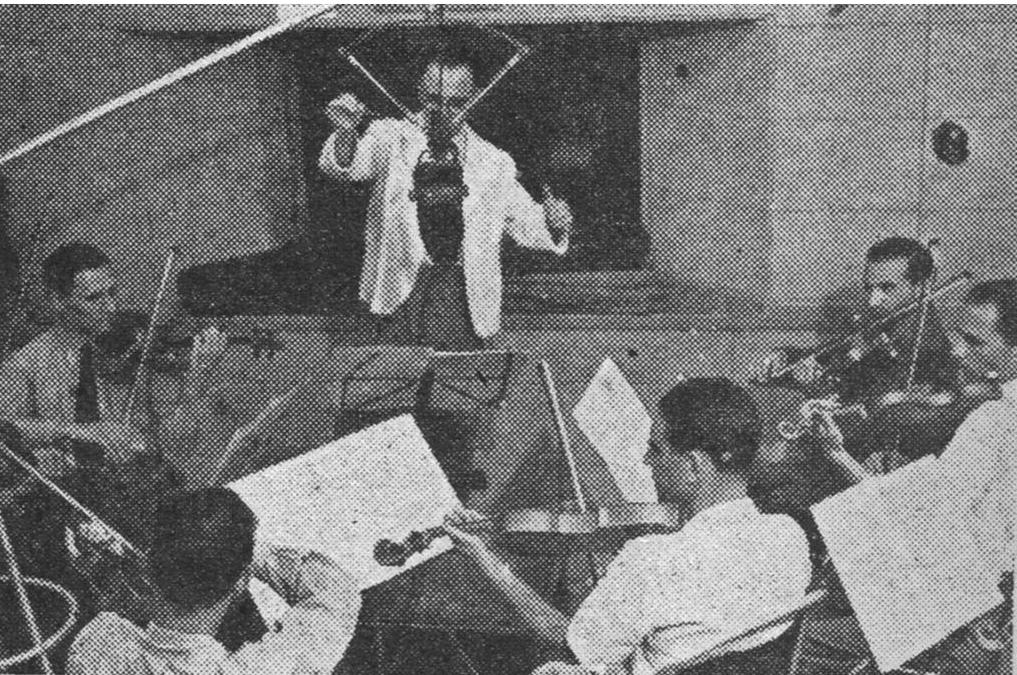 הקלטת קונצרט באולפני ירושלים. פורסם בחוברת "הגלגל" בתאריך 11.10.1945. הנגנים: מנצח: חנן שלזינגר כנרים: ראשון מימין- סשה פרנס, שלישי מימין, (באמצע)- אריה מירקין